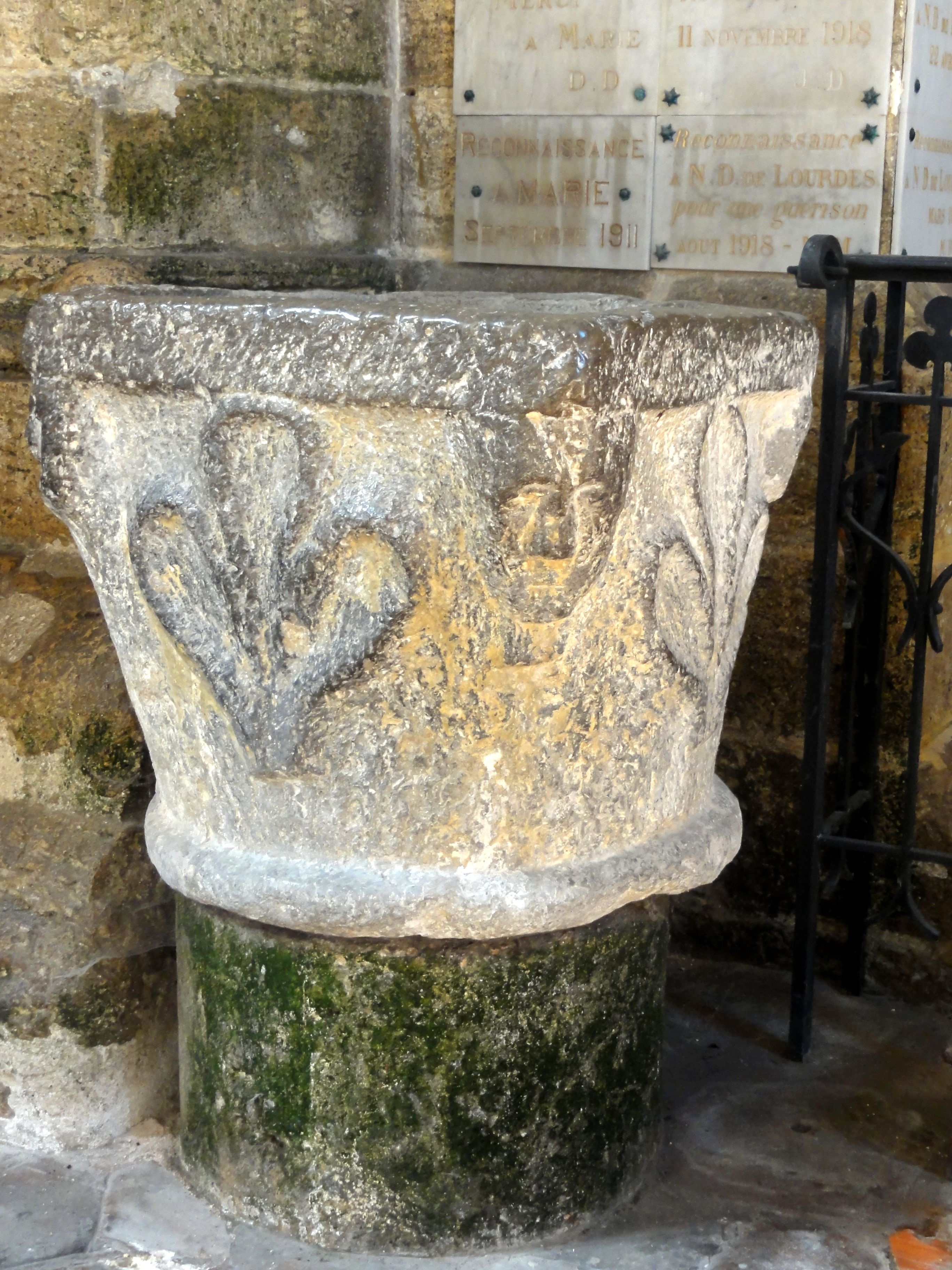 Bas-côté nord, bénitier (ancien chapiteau).